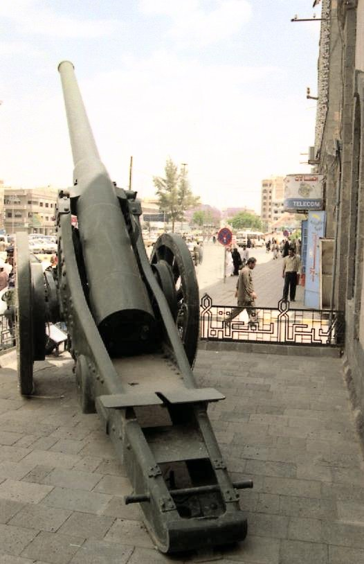 Canon britannique à Sana'a - Yémen